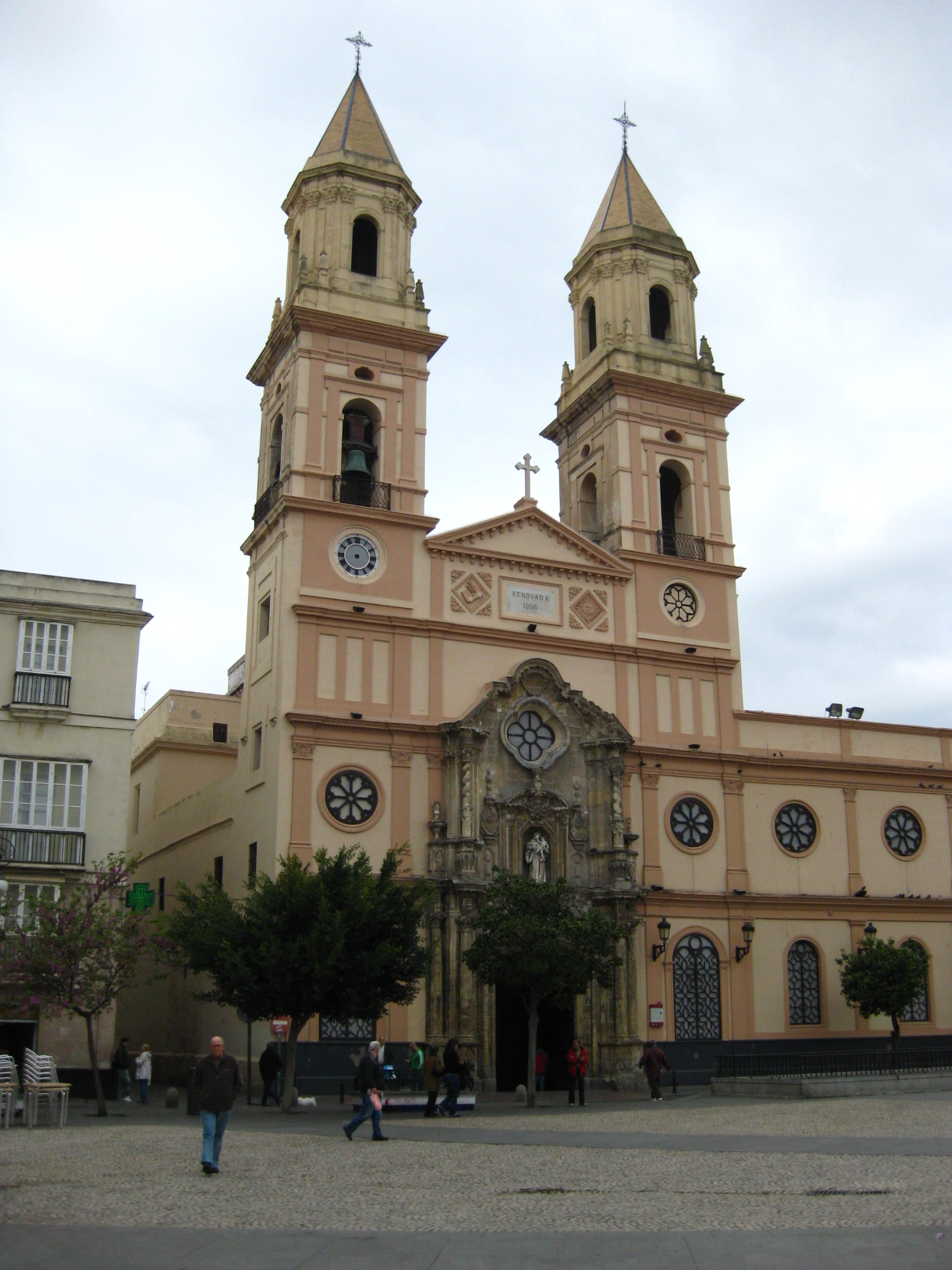 Plaza de San Antonio